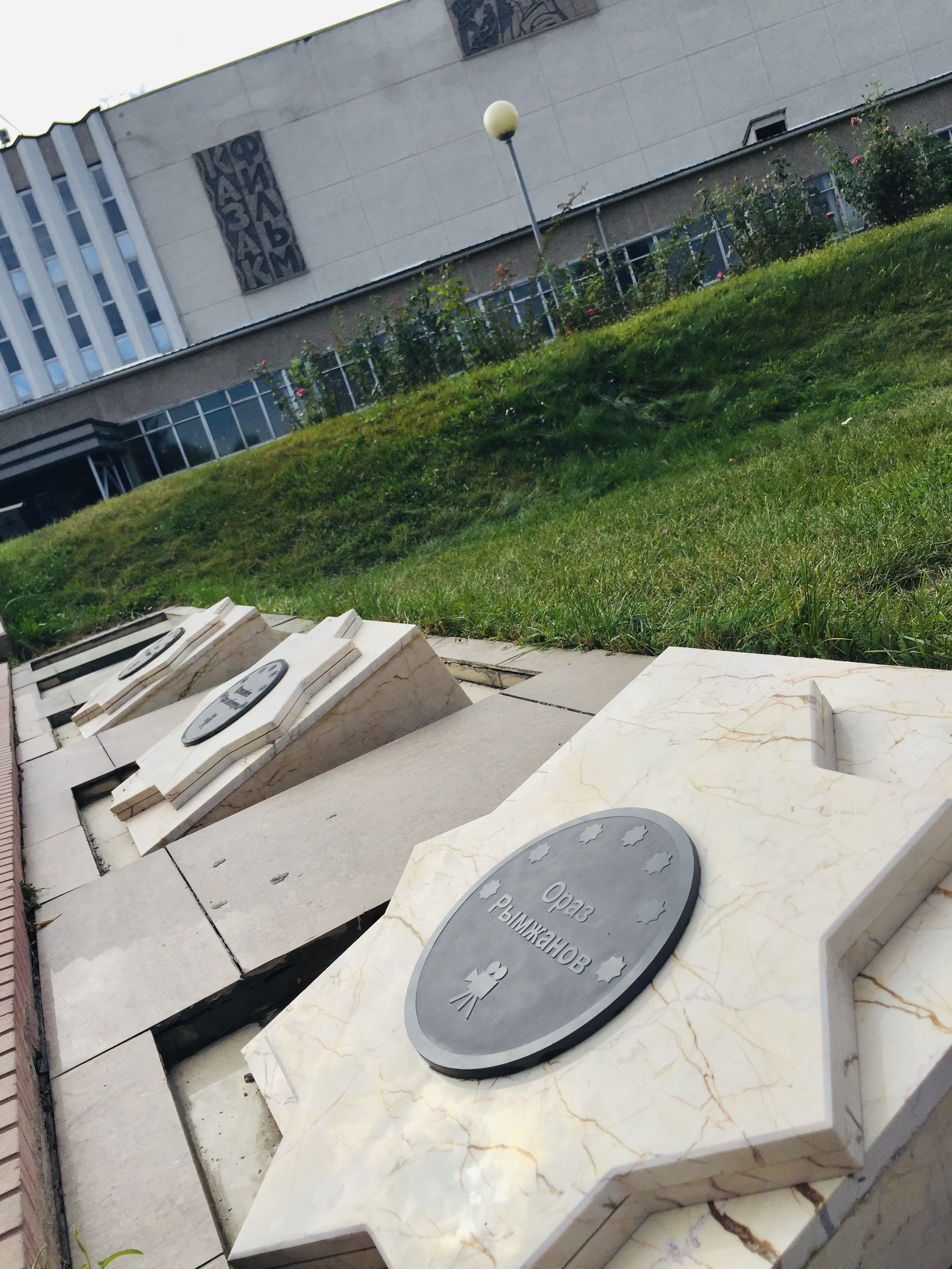 Звезда Ораза Рымжанова на алее слава киностудии "Казахфильм" в городе Алма-Ата